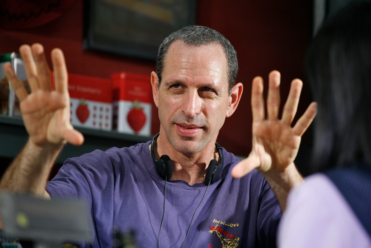 יצחק פלורנטין